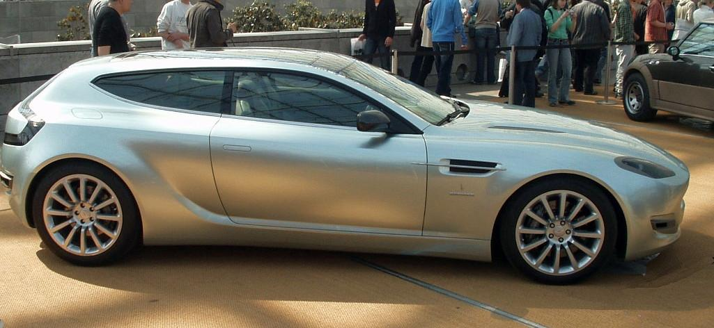 Bertone Jet 2